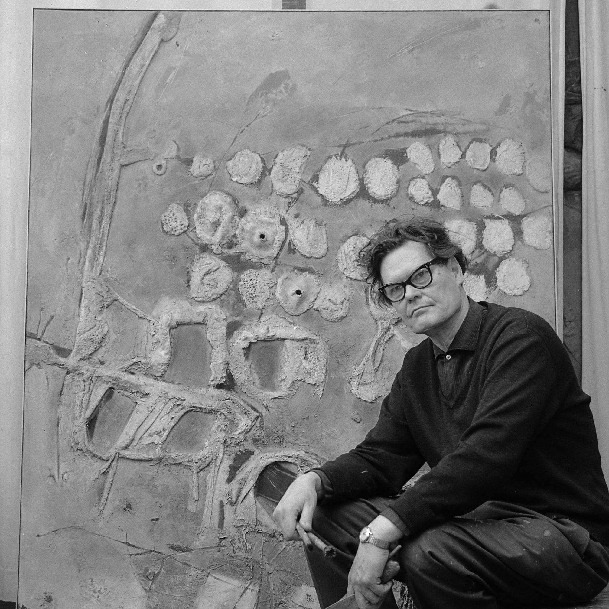 Jaap Wagemaker (schilder) krijgt de "Prix de la critique" , Jaap Wagemaker bij een van zijn werken 18 maart 1965